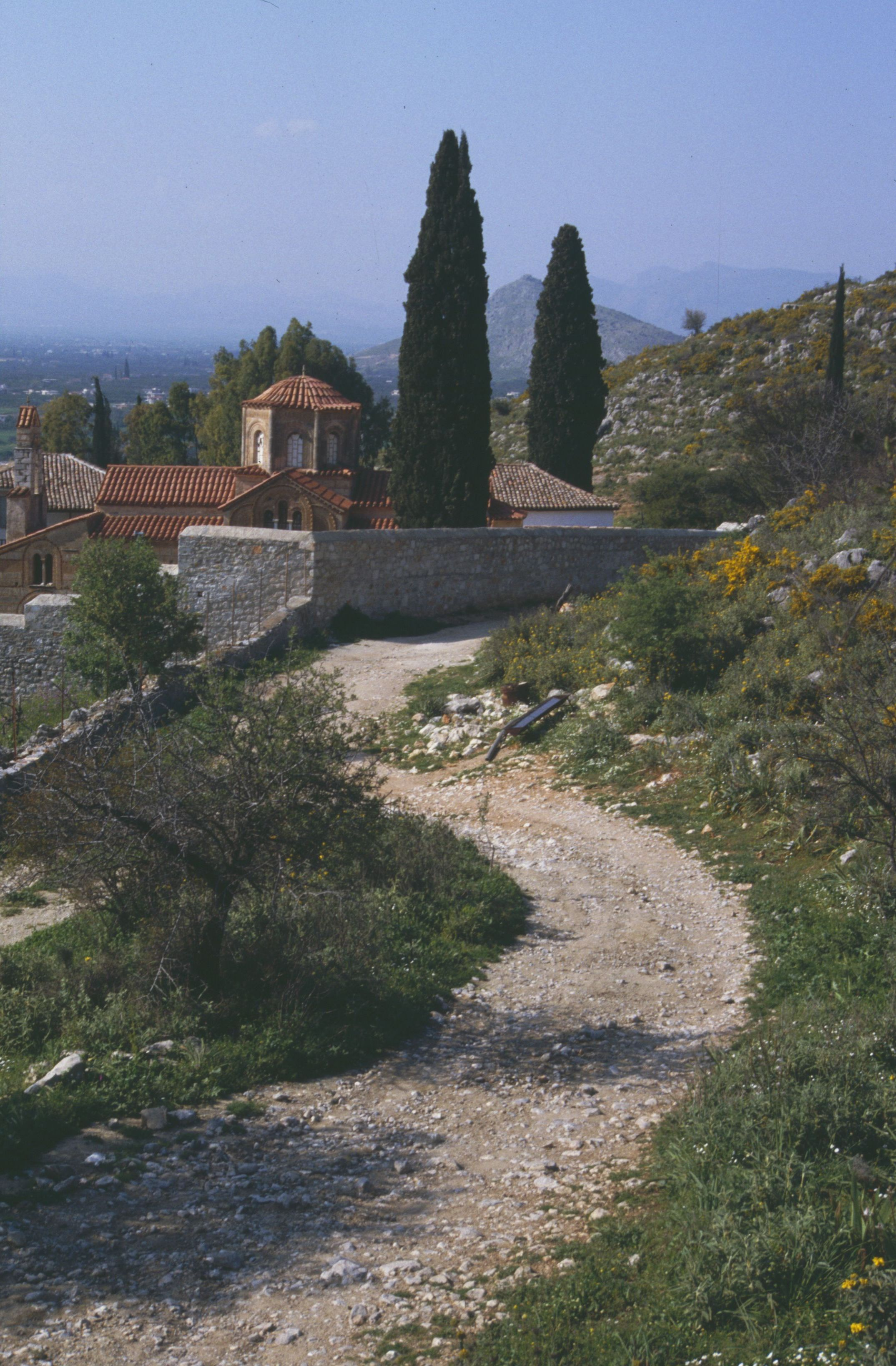 Kloster Agia Moni bei Nauplia